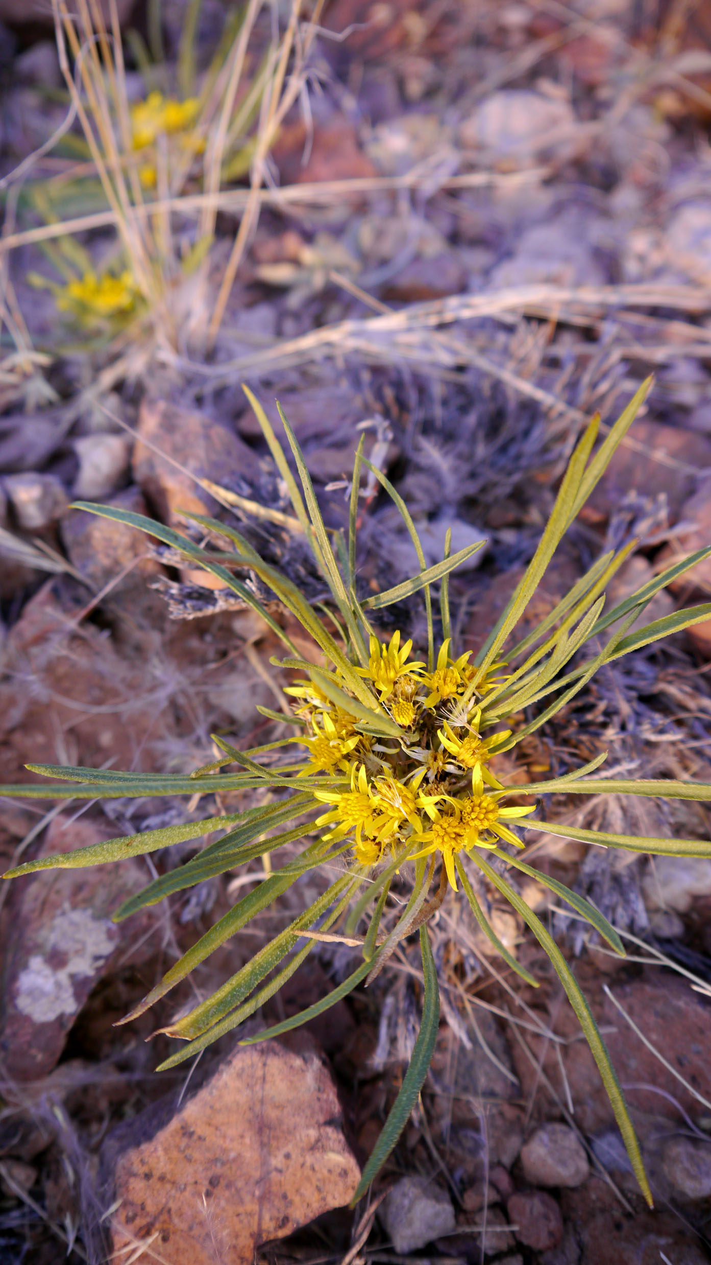 Geigeria ornativa en Sesriem (Namibia).